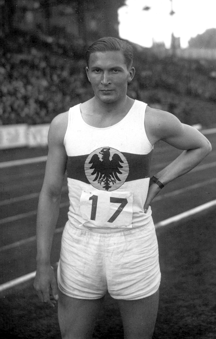 Colombes : France-Allemagne : Jonath (portrait à 2 m), allemand : [photographie de presse] / Agence Meurisse